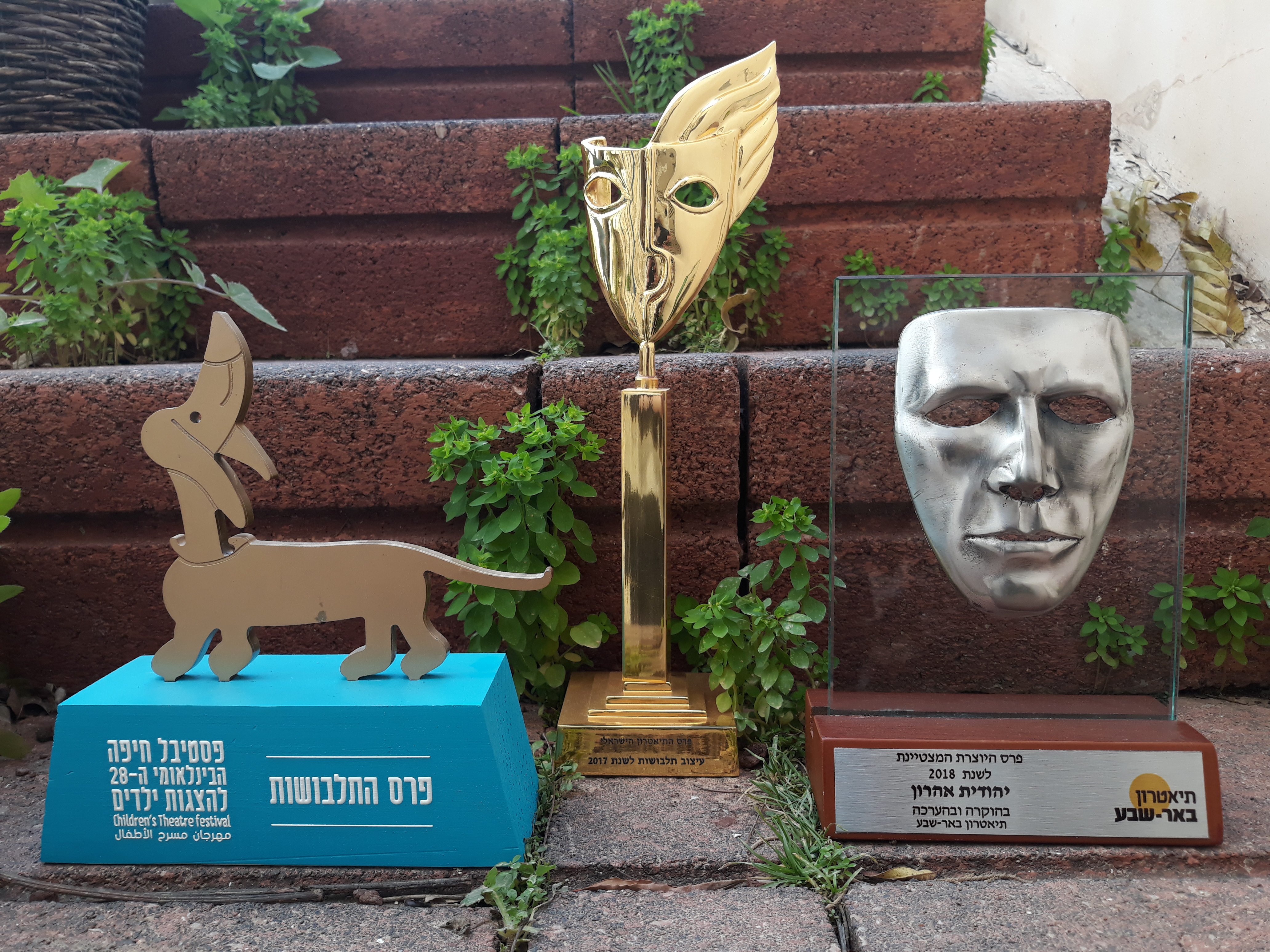 פרסים